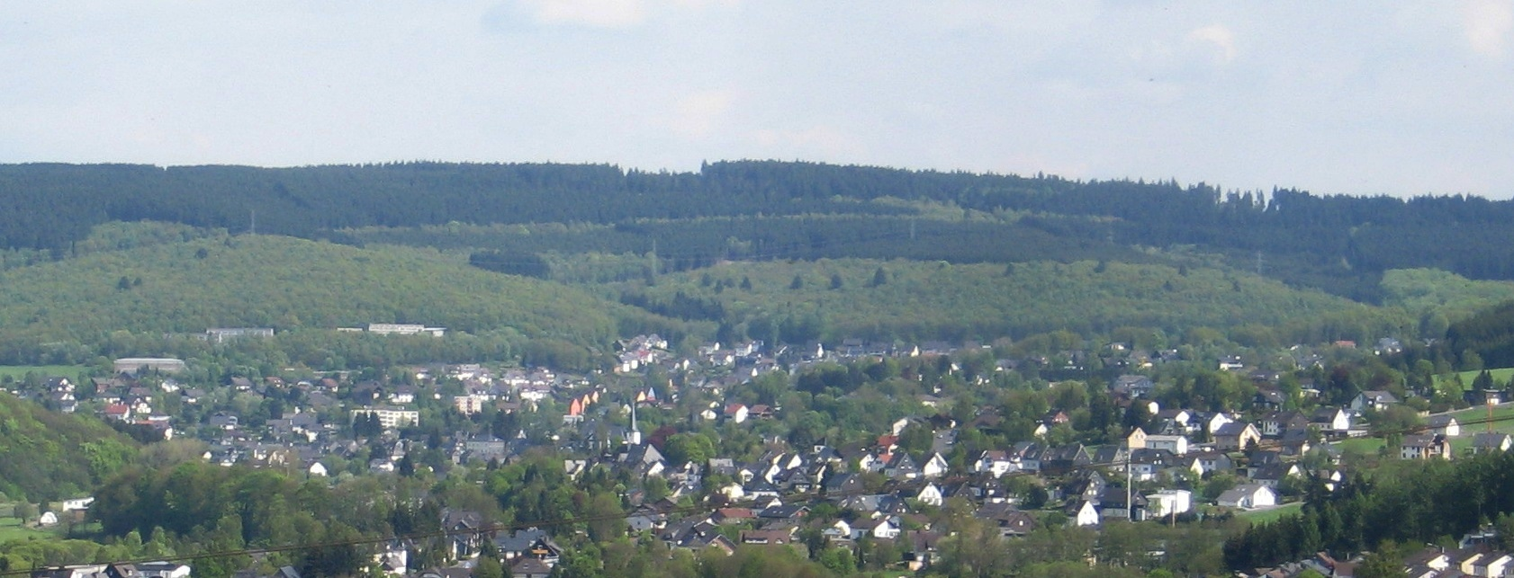 Blick auf Burbach (Siegerland), von Nordwest.